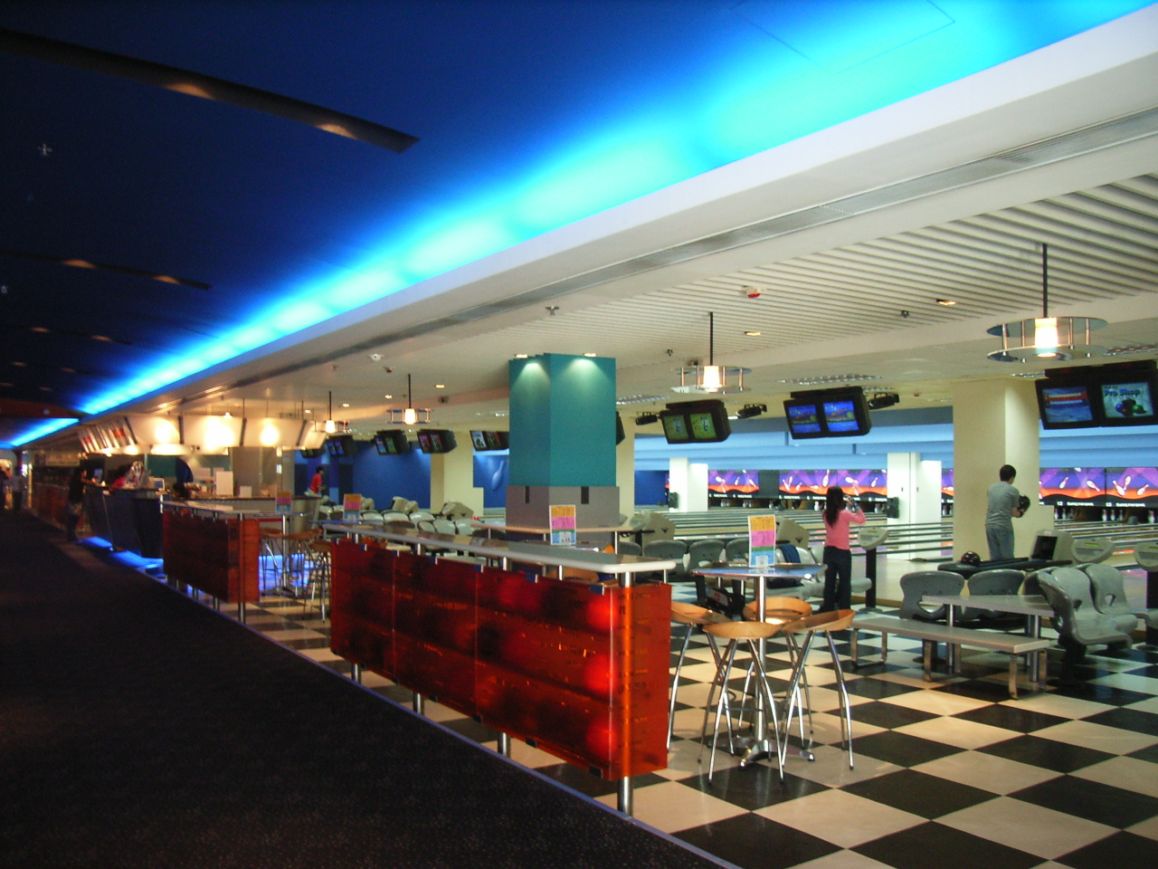 奧海城 (Olympian City)，是為zh:香港zh:九龍zh:大角咀zh:西九龍填海區內的建築群，屬於地鐵zh:奧運站一、二期物業發展項目，是九龍區主要zh:商場及zh:住宅之一，商場部分由zh:信和置業發展及管理，住宅部分則由信和置業及zh:地鐵有限公司共同發展及zh:物業管理。 Photo by User:OLAMB